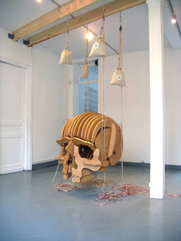 DEUSEXMACHINA.jpg